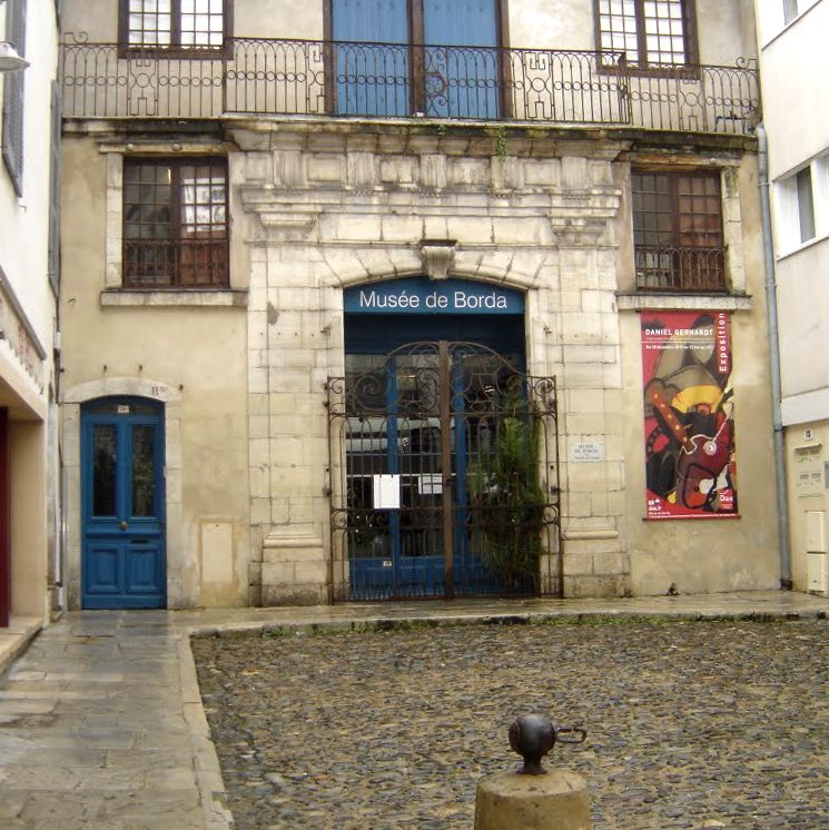 Entrée du musée de Borda.